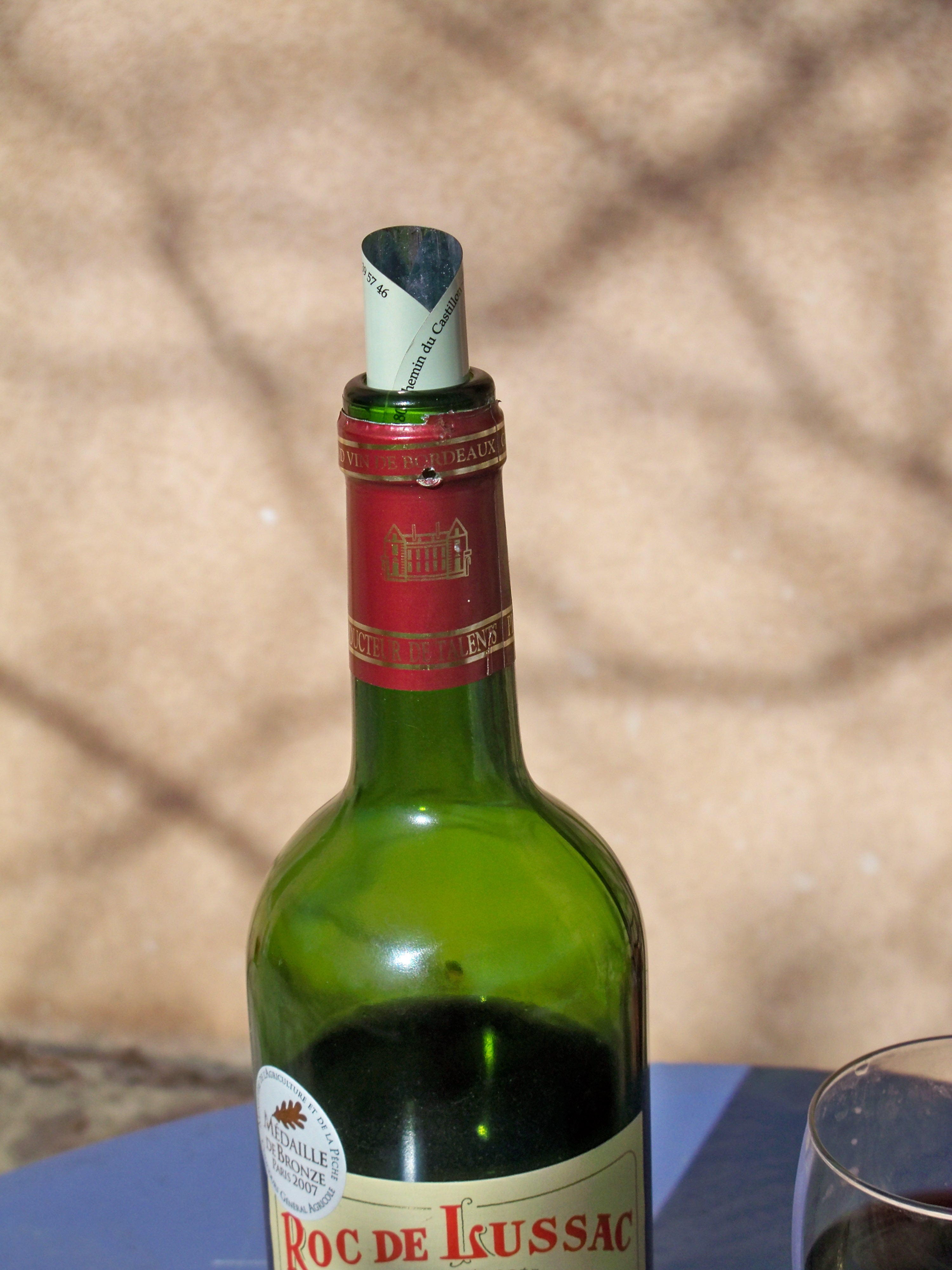 vin avec système anti goutte "Drop Stop"